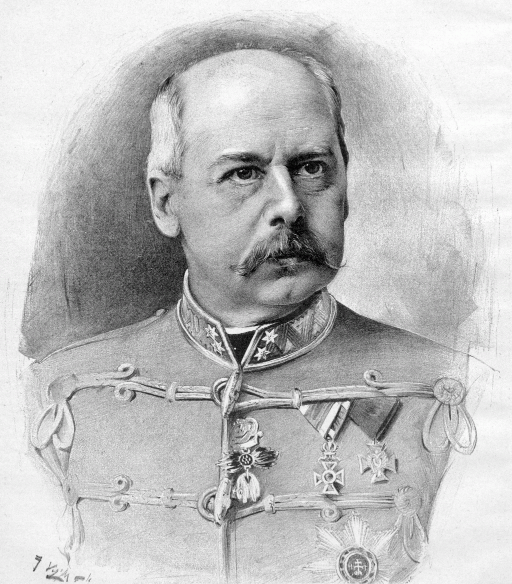 Gusztáv Kálnoky Kőröspataki (1832–1898), Austrian-Hungarian politician